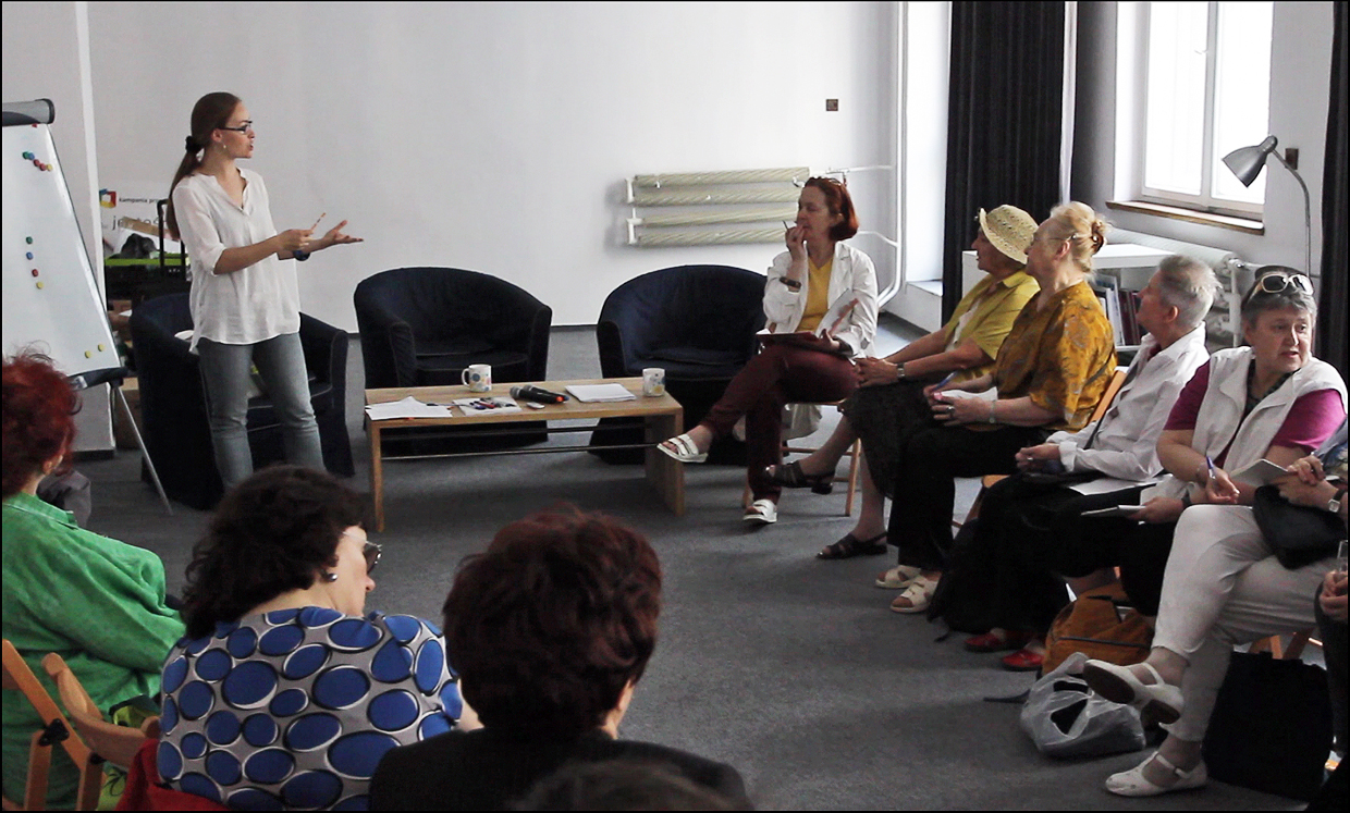 Warsztat nt. aktywności obywatelskiej w ramach projektu Obywatel/ka Senior/ka